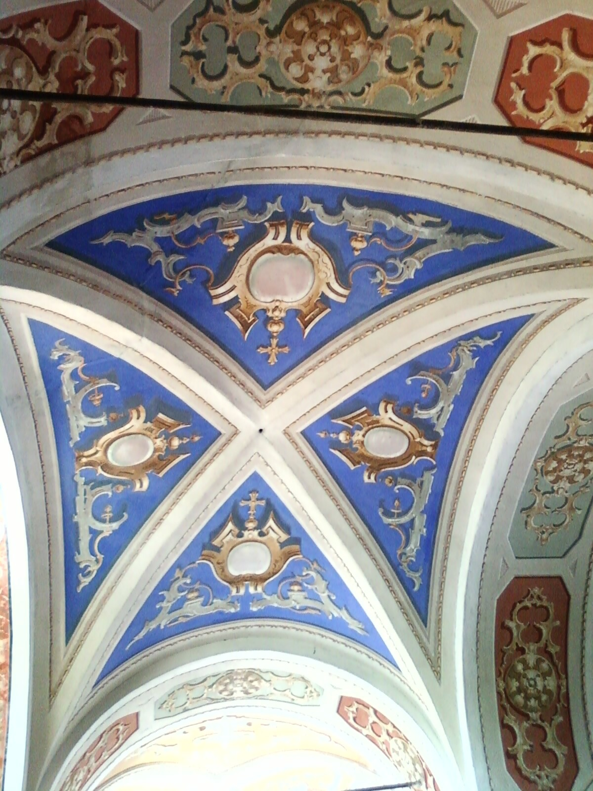 Chiesa di Stella San Bernardo, affreschi volte navate laterali, 1857 (Italy)